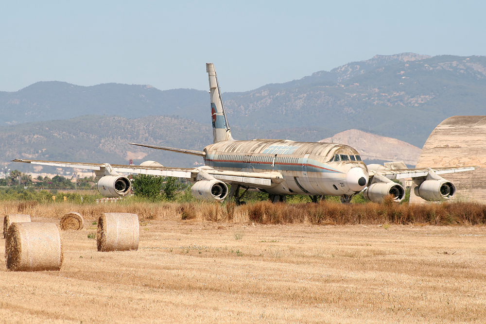 Spantax Convair CV 990 Coronado